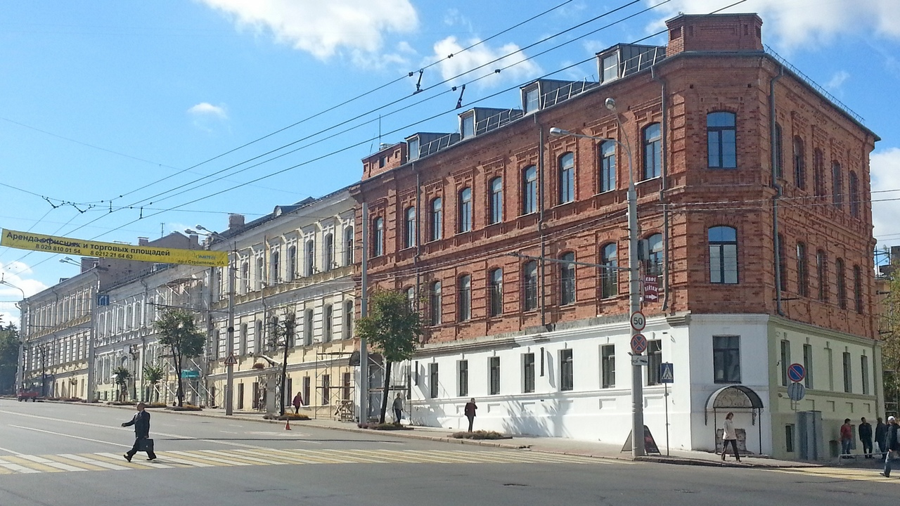 Беларуская (тарашкевіца): Будынкі былых казарм Ленкаранскага палку. г. Віцебск This is a photo of Belarusian heritage monument. Reference number: 213Г000046 ( WLM)